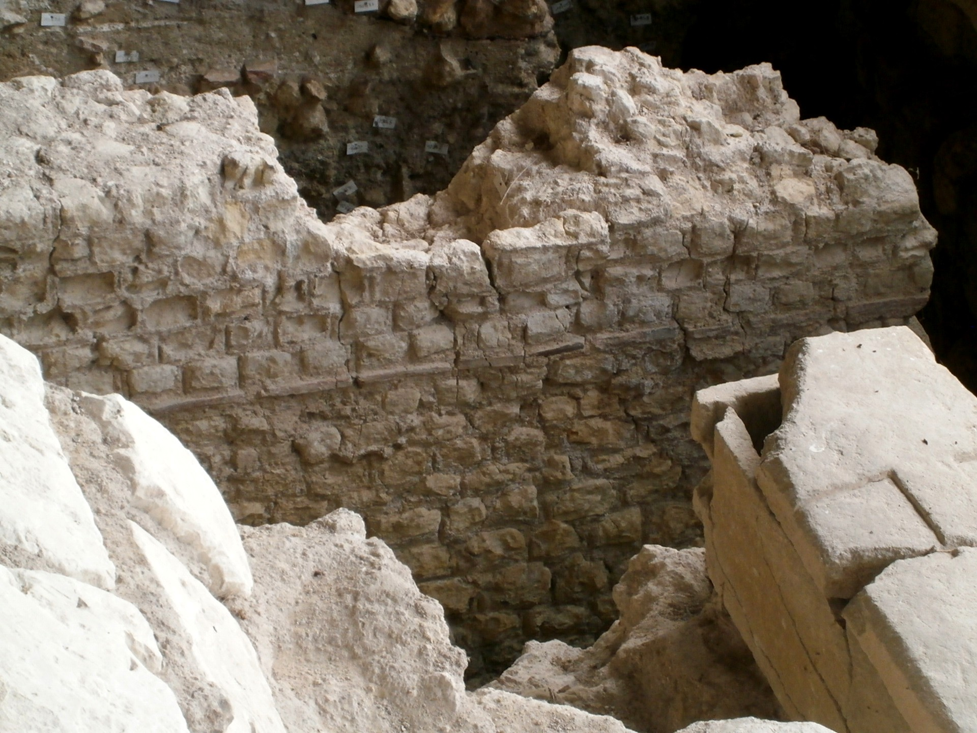 Vestige de mur antique dans les fondations des abbatiales